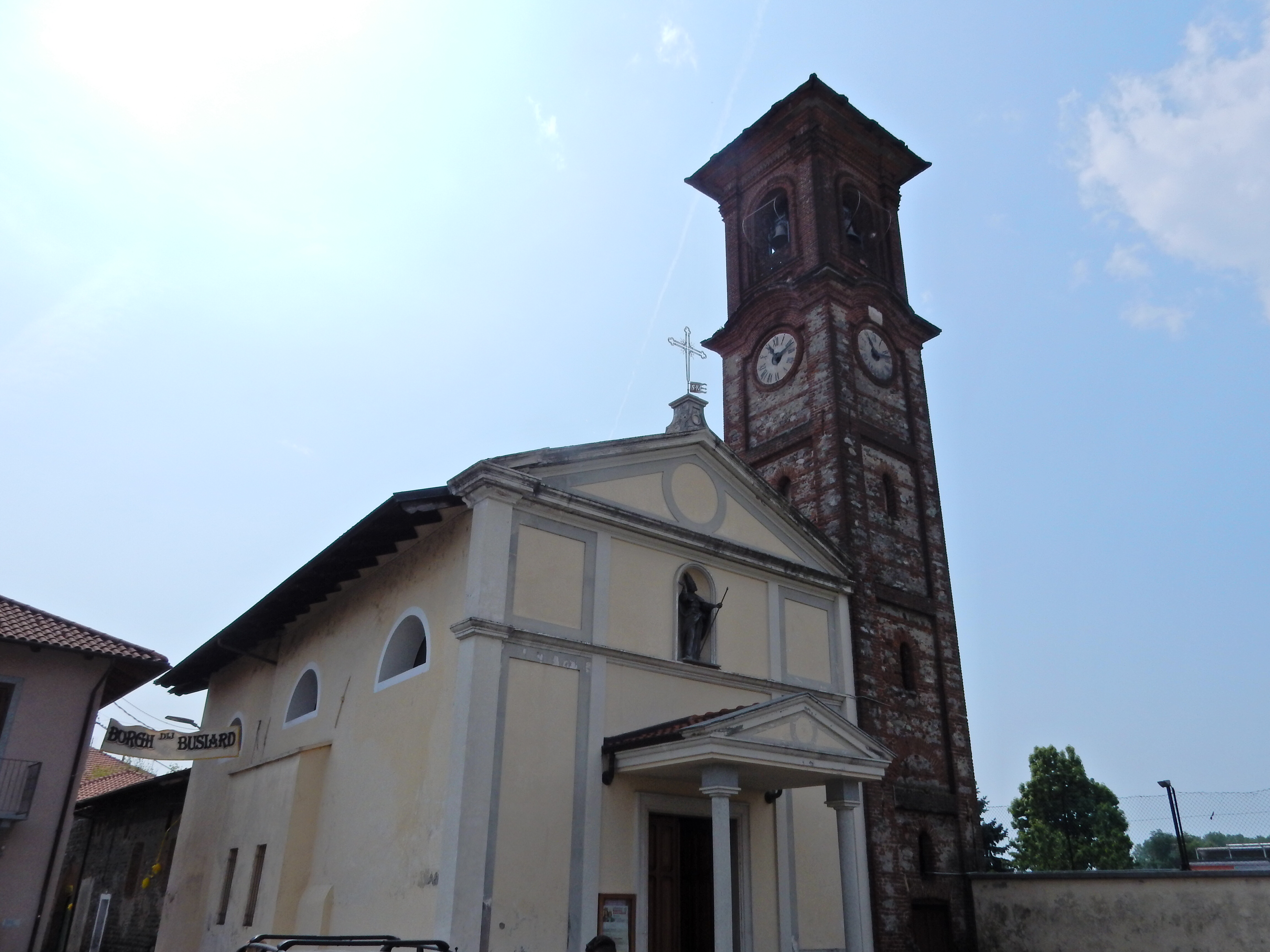 Veduta Chiesa Parrocchiale